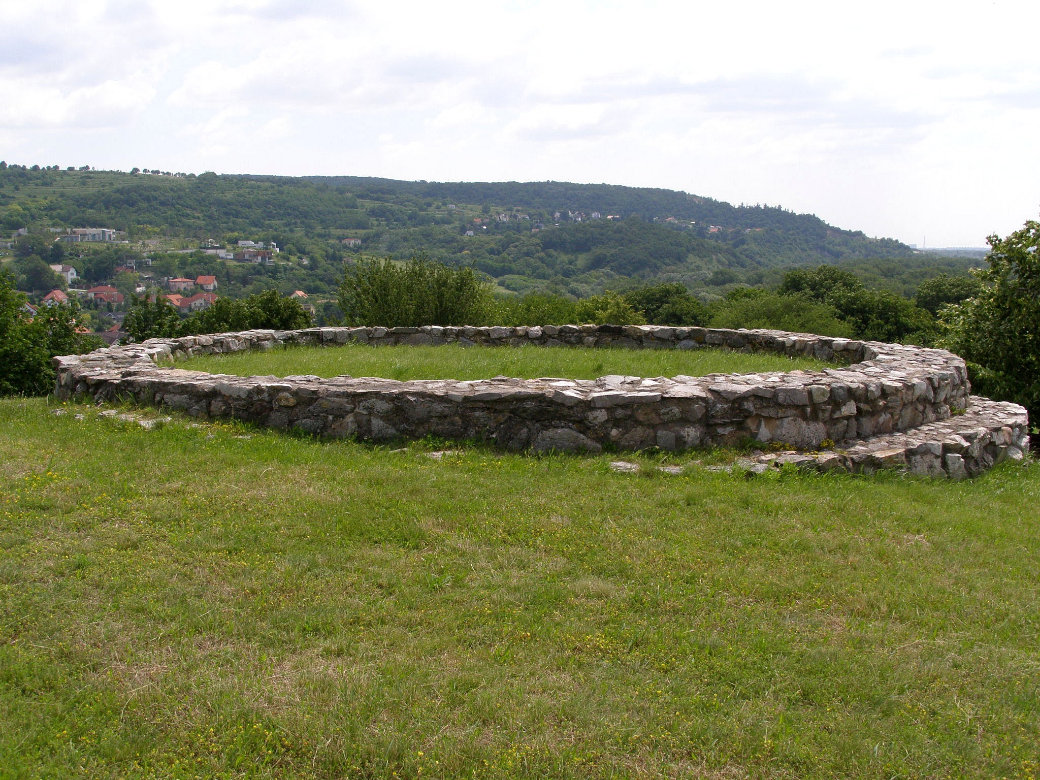 Základy ranogotickej kaplnky z 11. - 13. storočia na Devínskom hrade